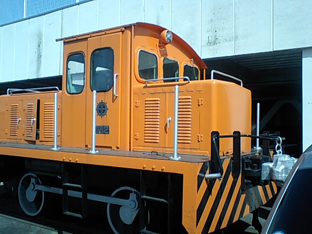 JR網干駅構内に保存される北沢産業鉄道のDB2型機関車